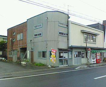 十和田観光電鉄百石案内所